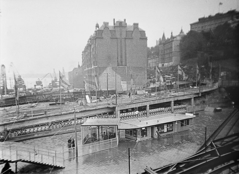 Slussområdet under ombyggnaden: Tunnelbanestationen vid Slussen